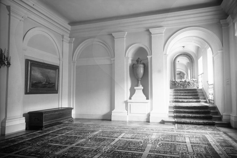 Das Vestibül des Reichspräsidentenpalais.